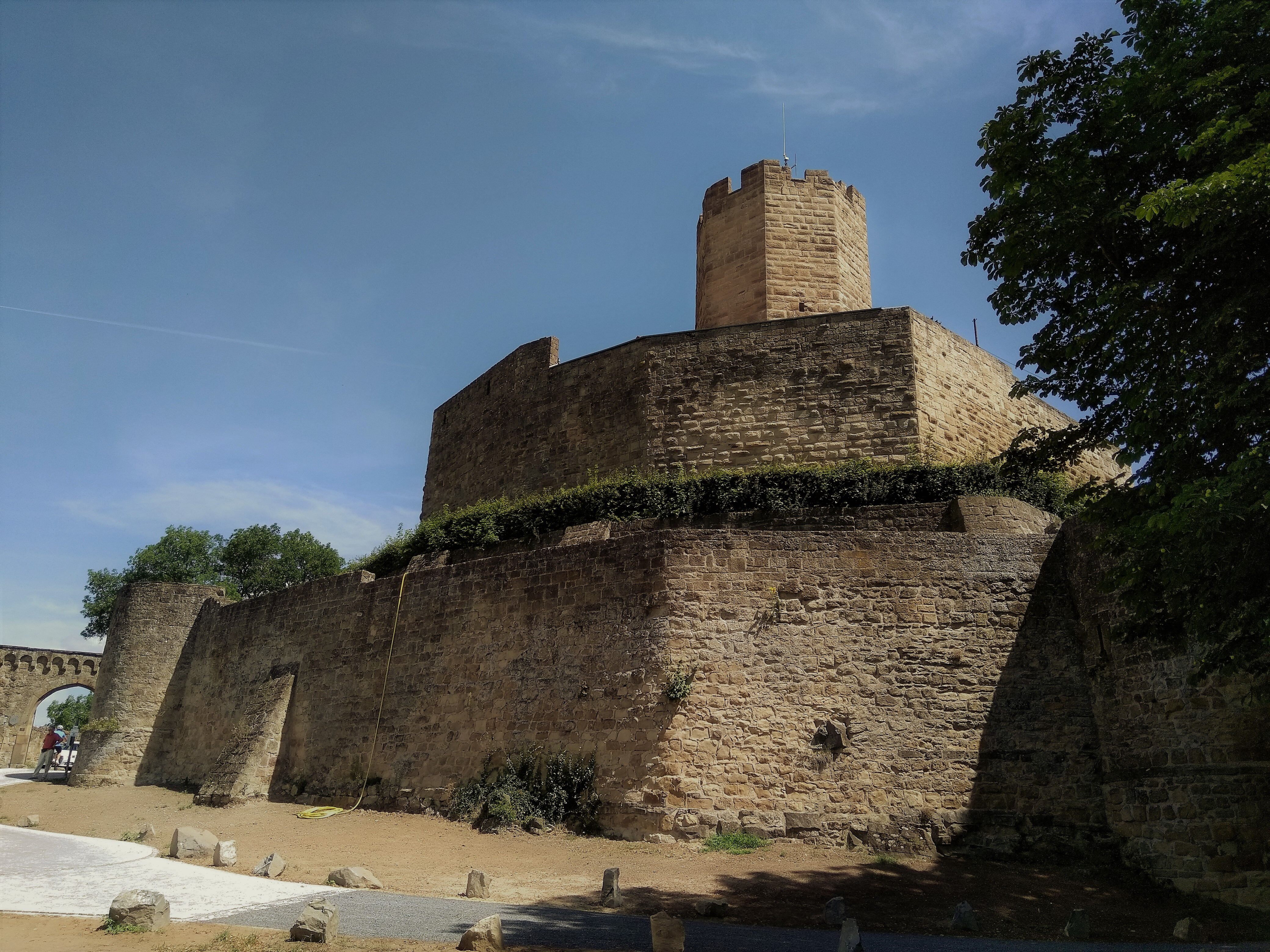 Vaade linnusele läänest, esiplaanil eeslinnuse zwinger, tagaplaanil pealinnuse mantelmüür ja valdustorn.